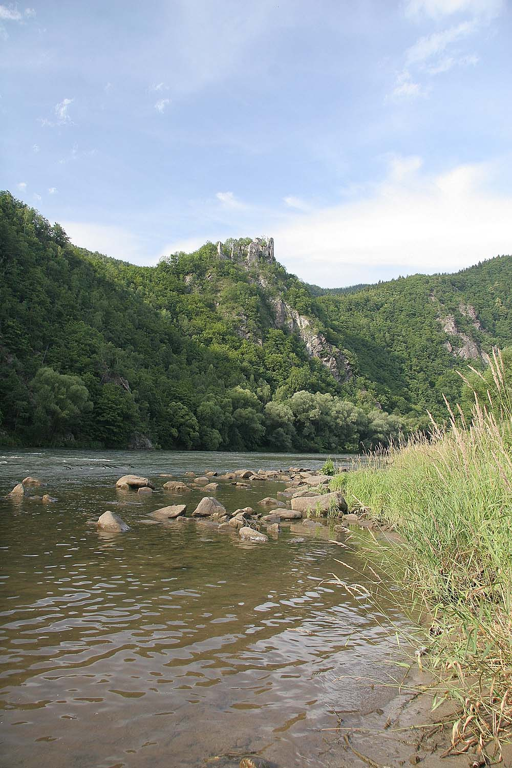 Castle Starý hrad